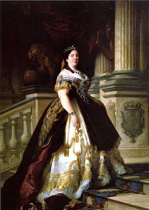 Retrato de la reina Isabel II de España (1830-1904), que fue la hija y heredera del rey Fernando VII y la madre de Alfonso XII.